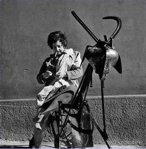 Η Ναταλία Μελά, εγγονή του Μακεδονομάχου Παύλου Μελά, σπούδασε στην Ανωτάτη Σχολή Καλών Τεχνών με καθηγητή τον Μιχάλη Τόμπρο και εργάστηκε στο εργαστήρι του Θανάση Απάρτη. Συνεργάστηκε με τον Δημήτρη Πικιώνη και με το Θέατρο Τέχνης. Παντρεύτηκε με τον Άρη Κωνσταντινίδη και μέχρι σήμερα θεωρείται από τις σημαντικότερες γλύπτριες. Αντλεί τα θέματά της από το φυσικό κόσμο και από την ελληνική μυθολογία.